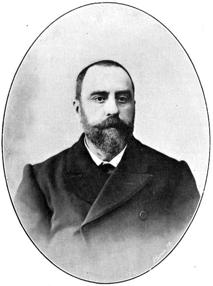 Retrato de Juan Bautista Lázaro, en La Ilustración Española y Americana.